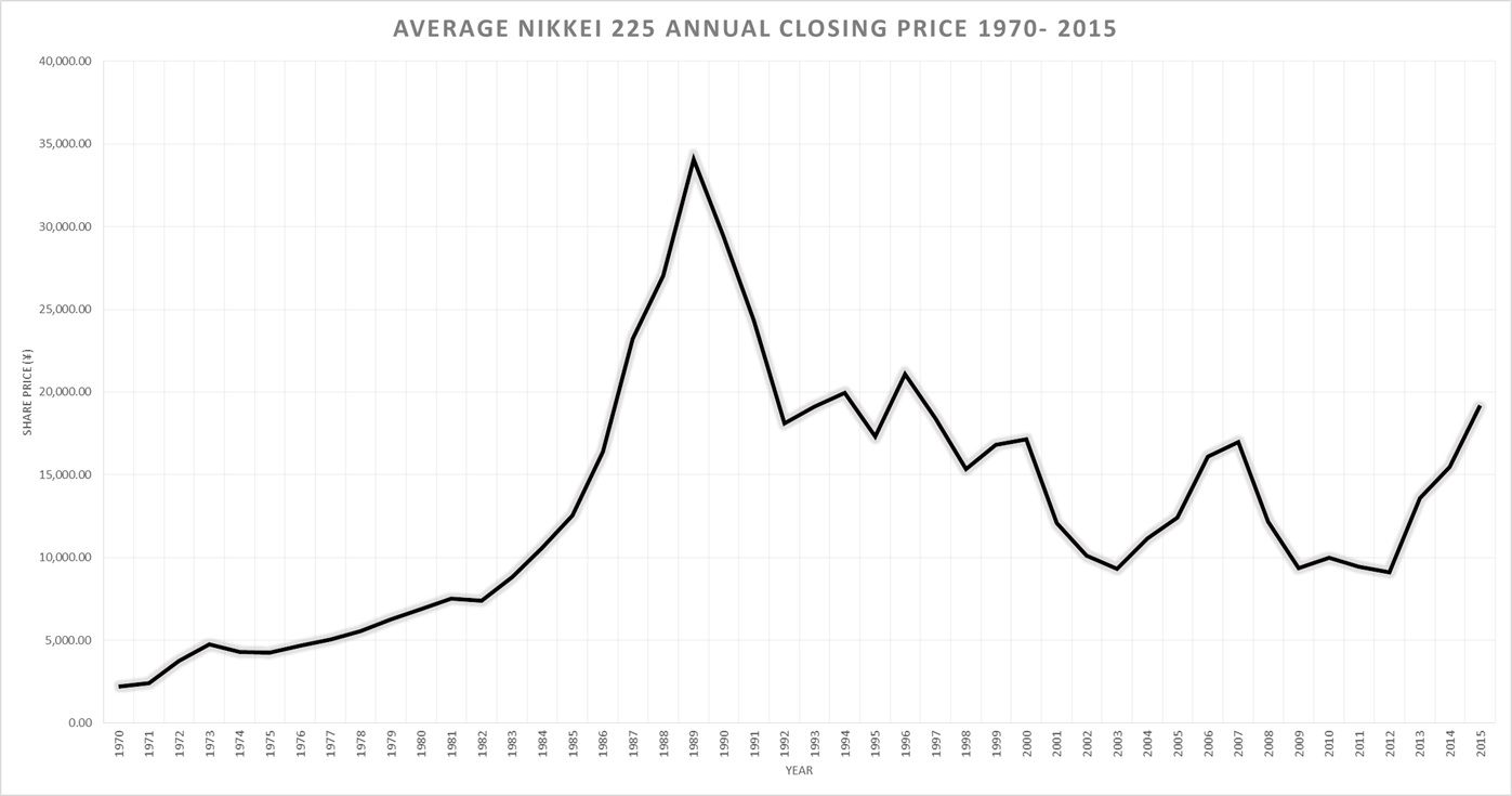 Harga saham Nikkei (purata tahunan) yang ditunjuk dari 1970 hingga 2015